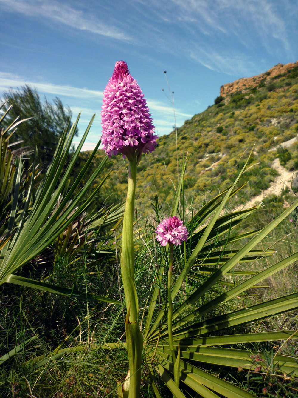 Anacamptis pyramidalis. Orquídea en la Sierra de Cartagena (España).